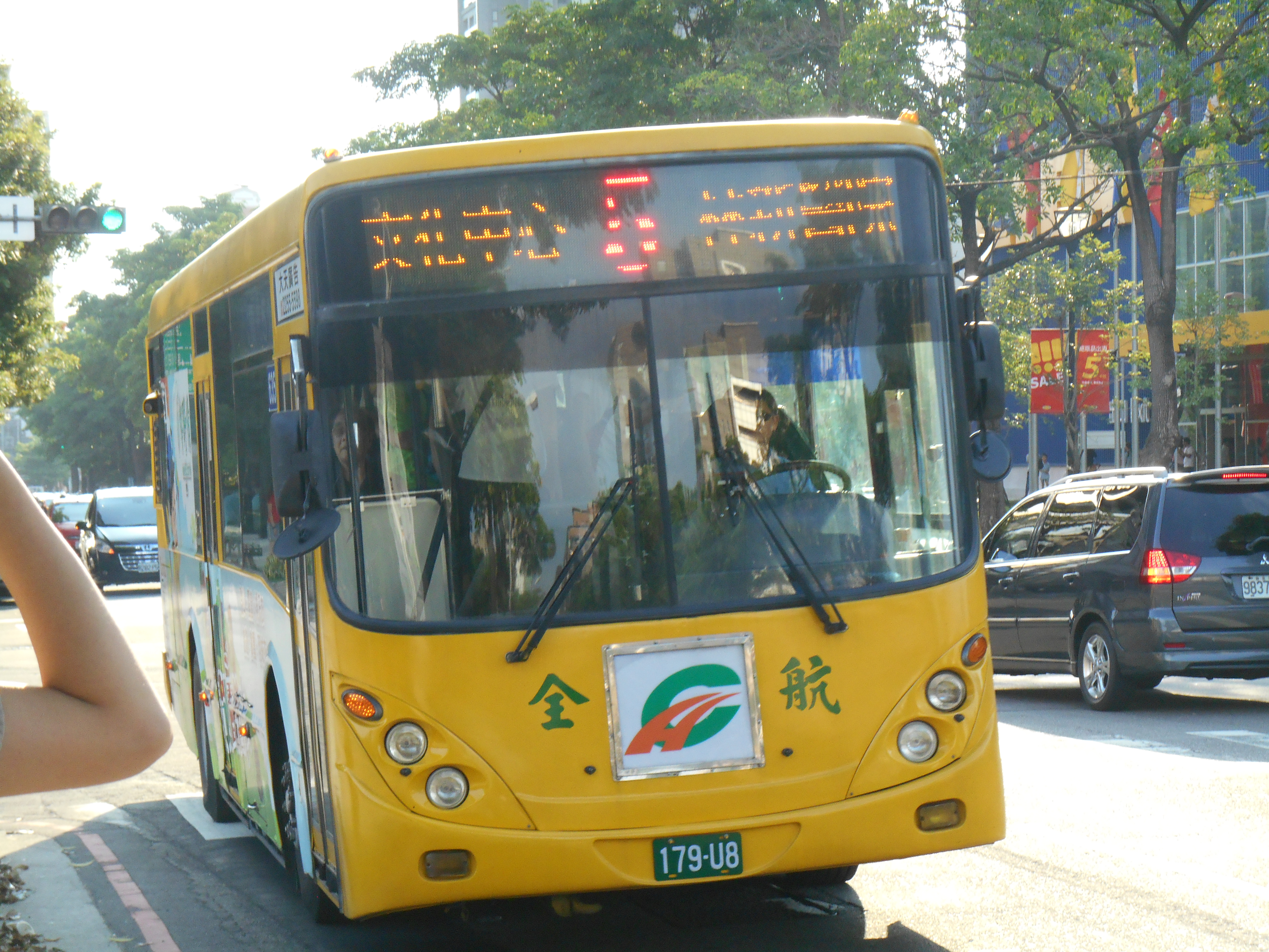 2006(2014) HINO ERK1JML市區型